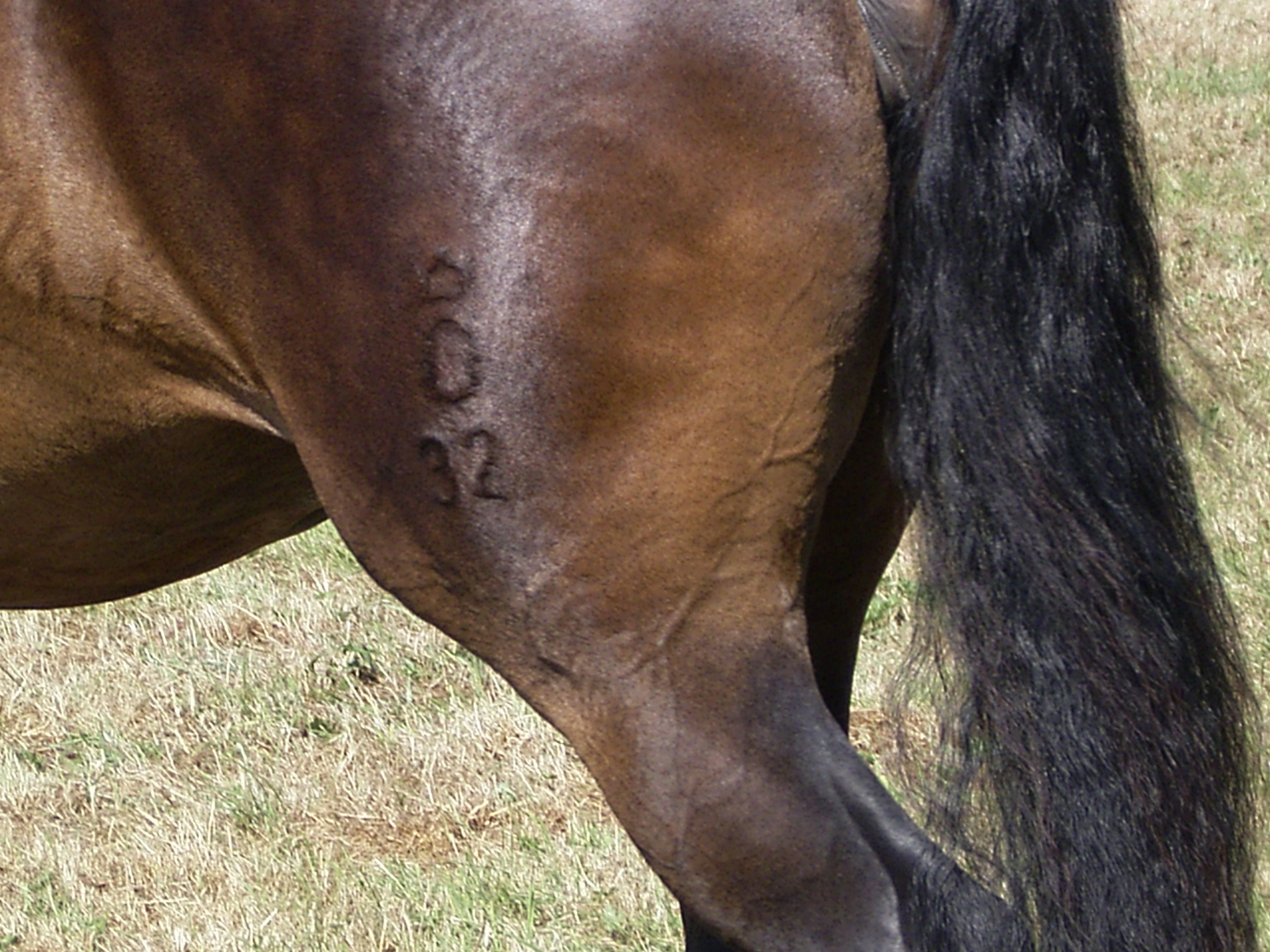 Brandzeichen der Oldenburger